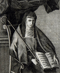 Historia del real monasterio de la SSma. Trinidad, religiosas de Santa Clara, ...